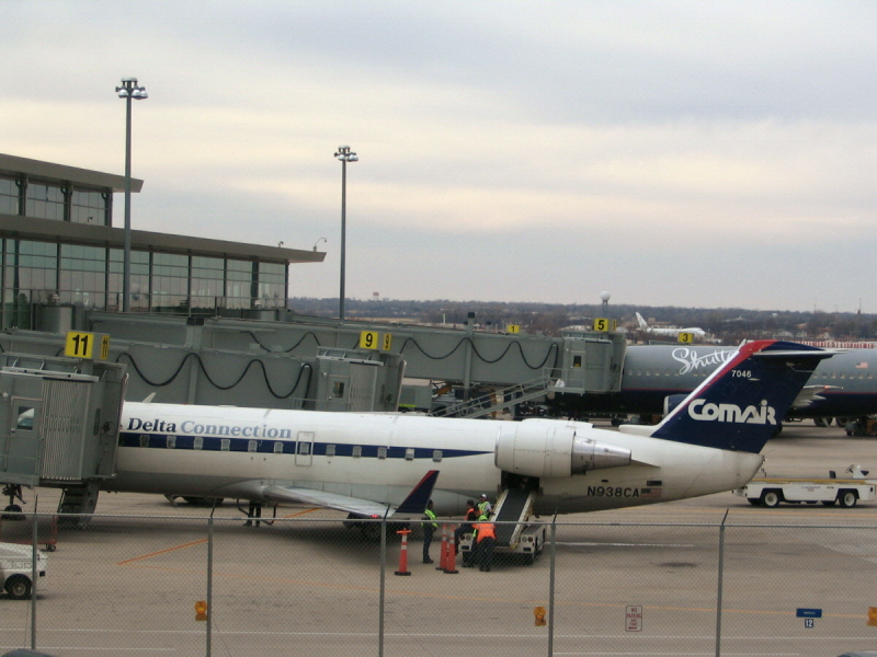 Delta Connect Canadair CRJ-100ER